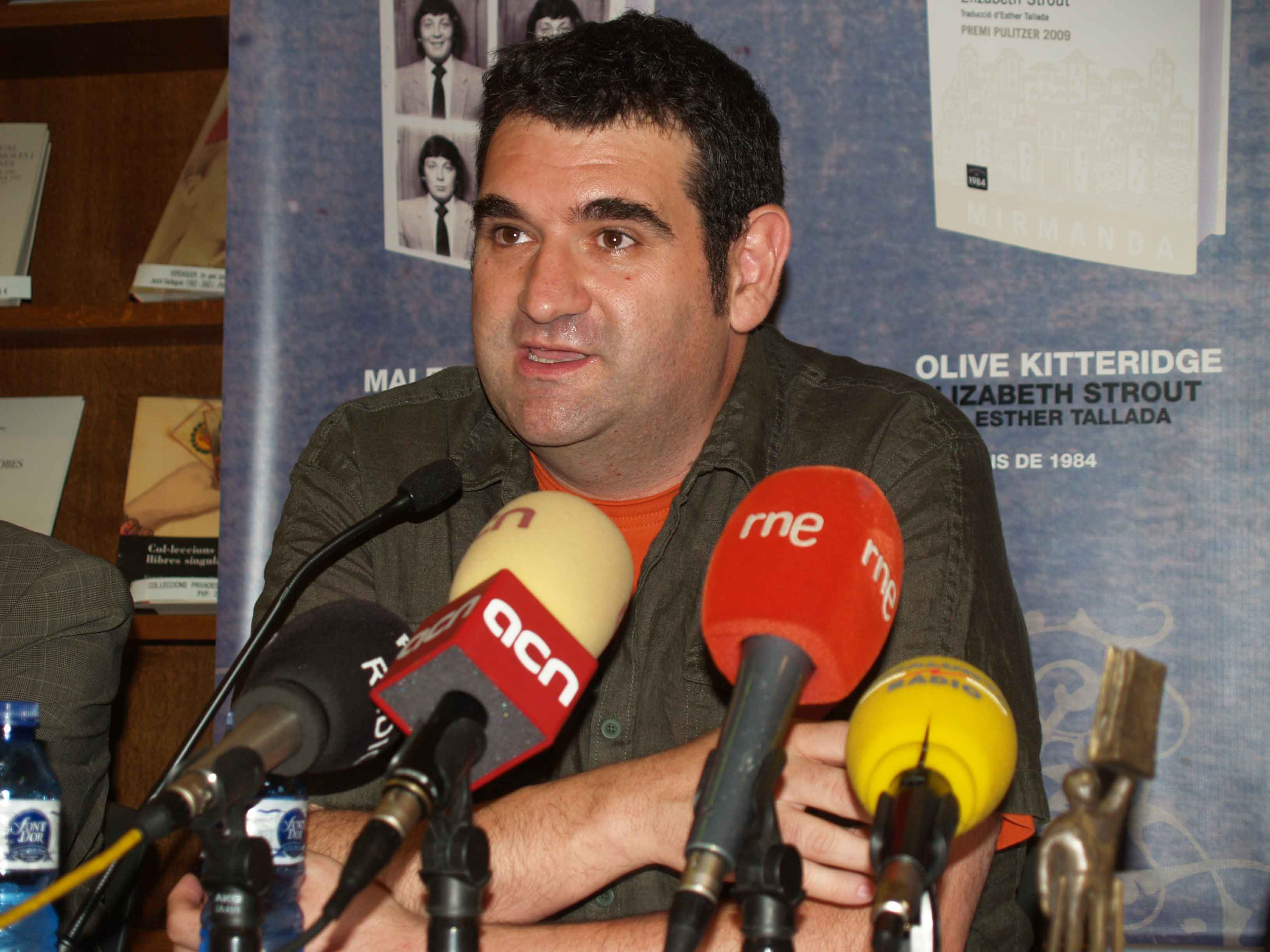 roda-premsa-llibreter_web4